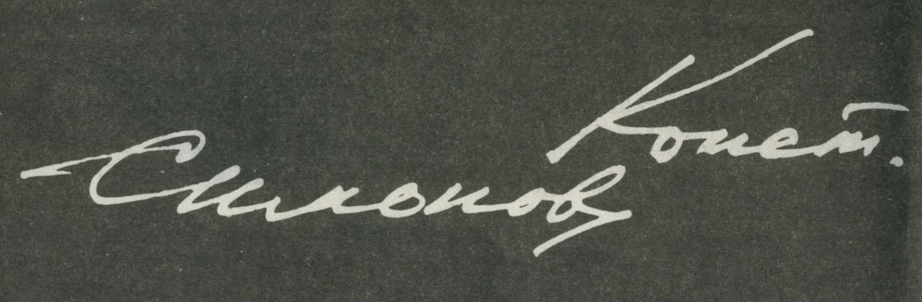 Автограф советского писателя К. М. Симонова